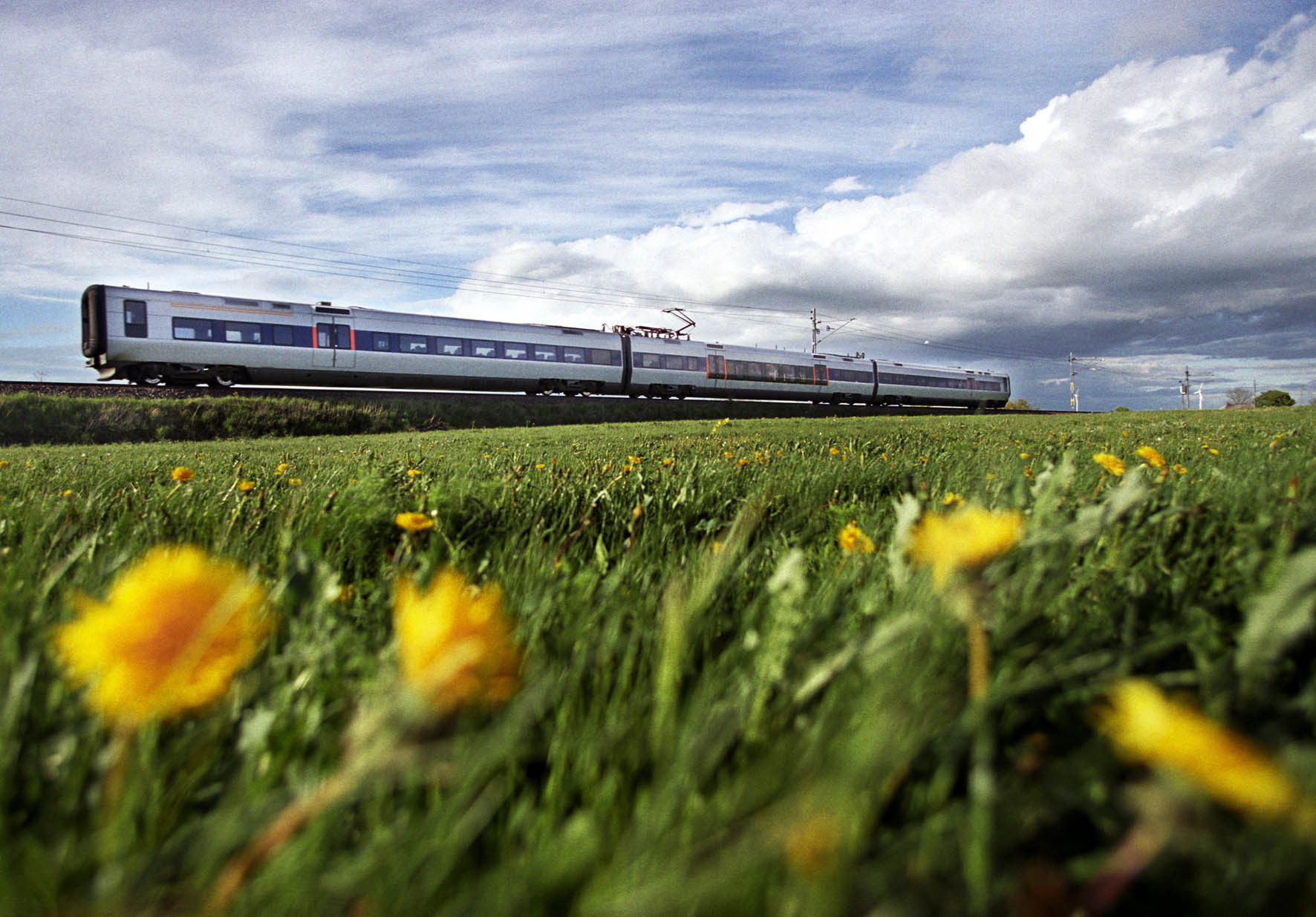 Öresundståg som far fram genom ett fält.